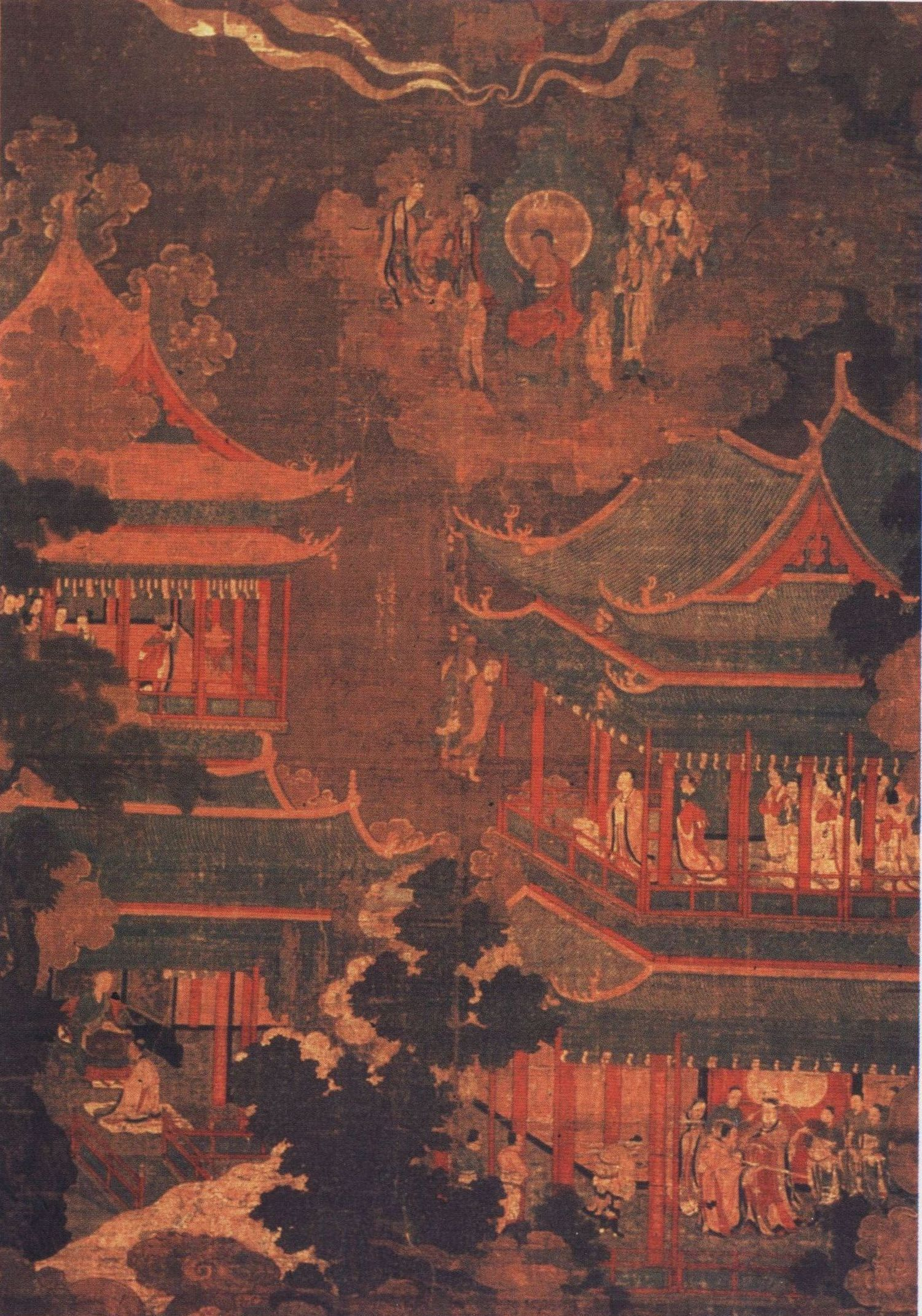 "관무량수경" 서품의 내용을 묘사한 고려시대의 불화.